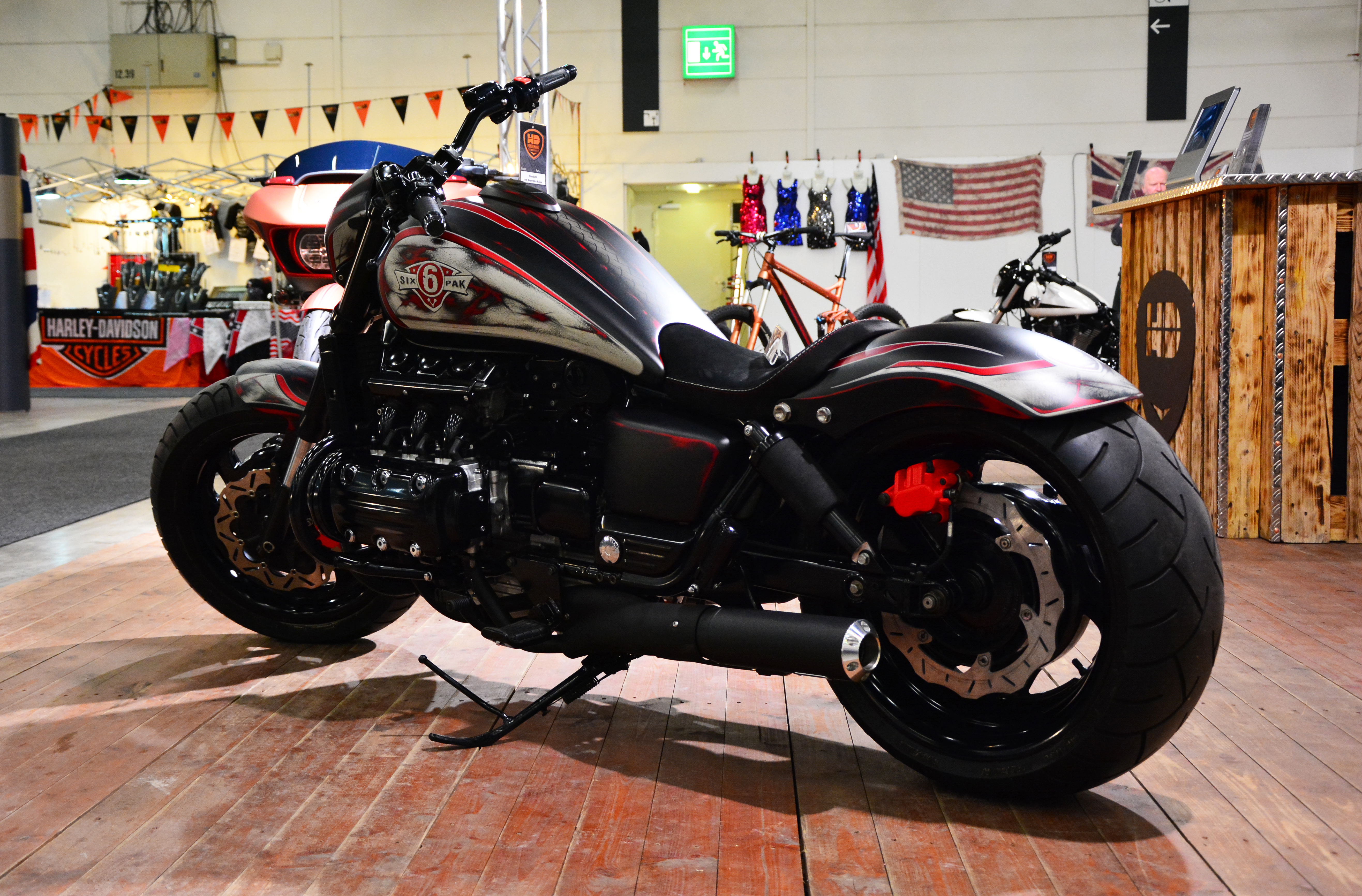 Honda F6 Superbike (2015) bei den Hamburger Motorrad Tagen 2015